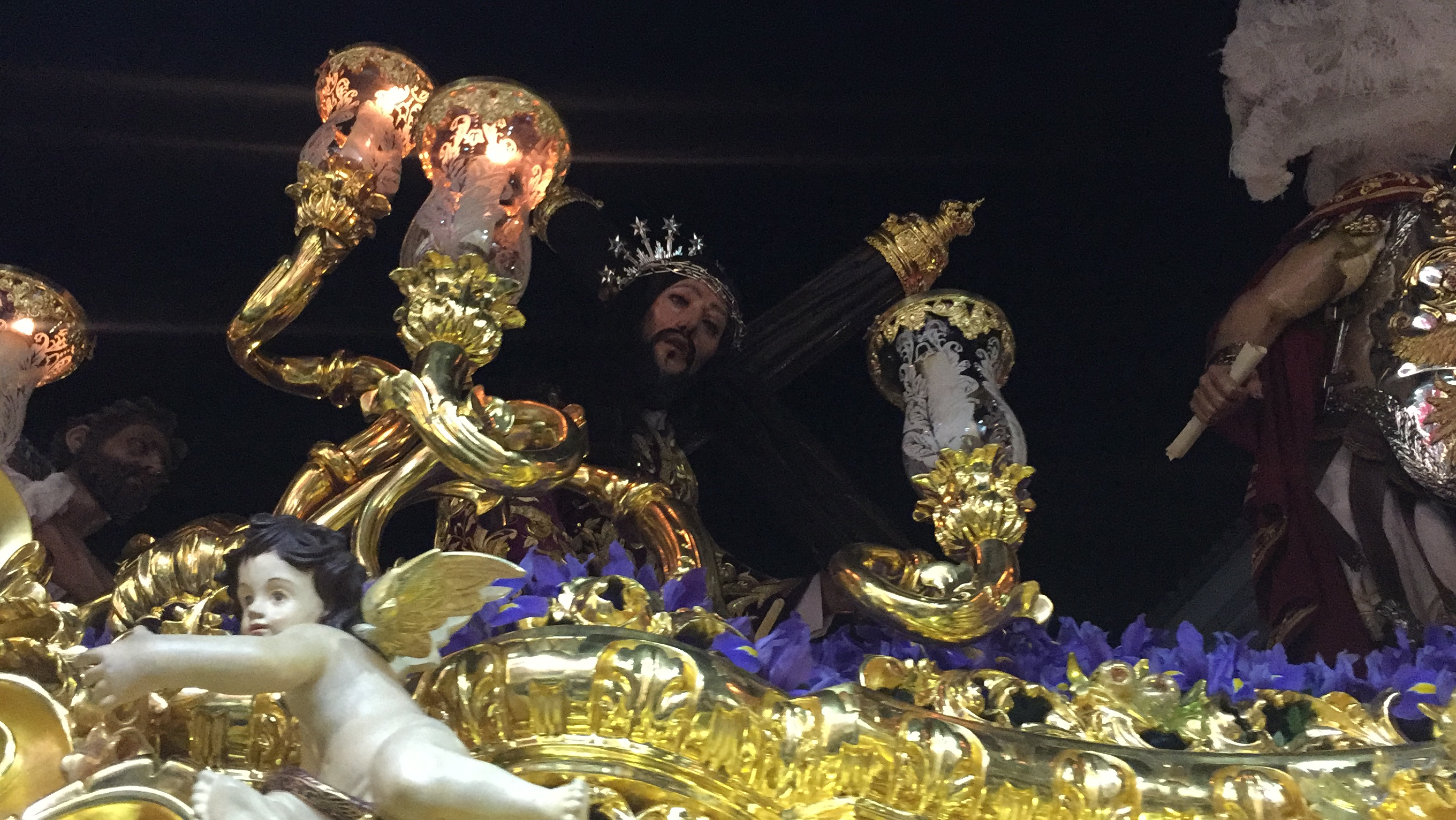 Tres caidas